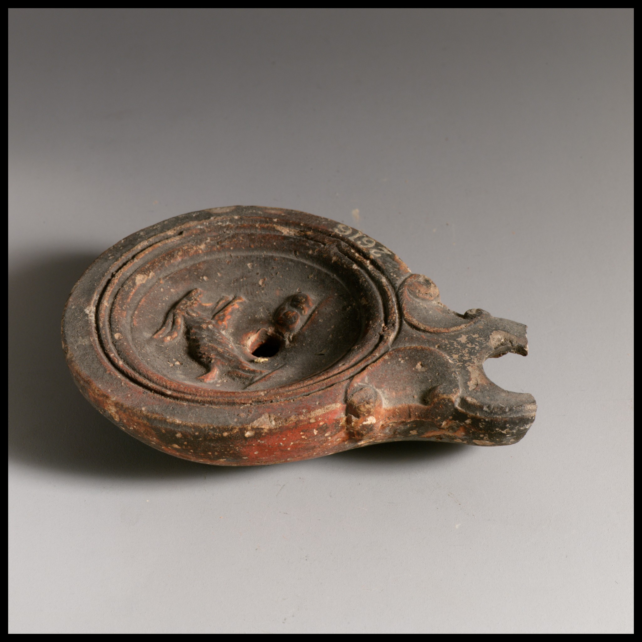 Roman; Lamp; Terracottas